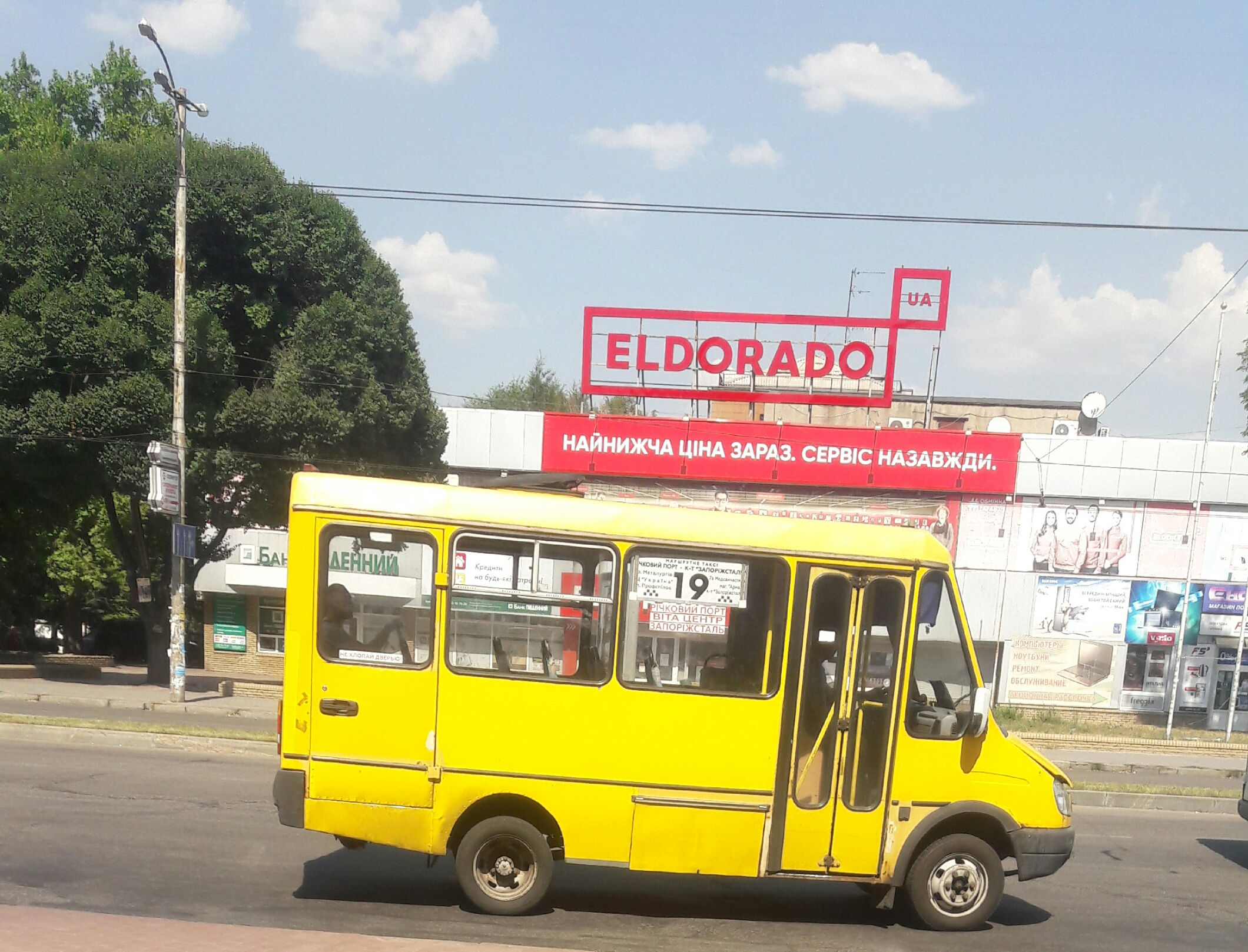 Запоріжжя. БАЗ-2215 «Дельфін» на маршруті № 19